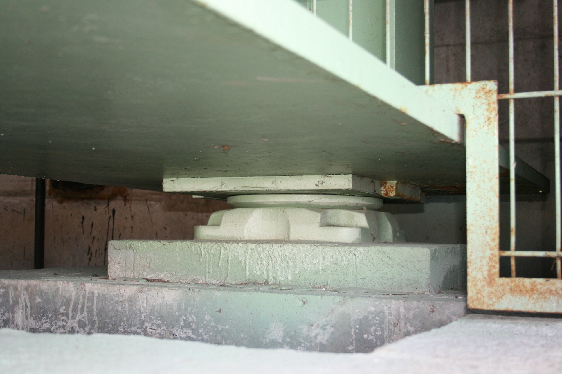 Pont de Jargeau (Loiret - France)